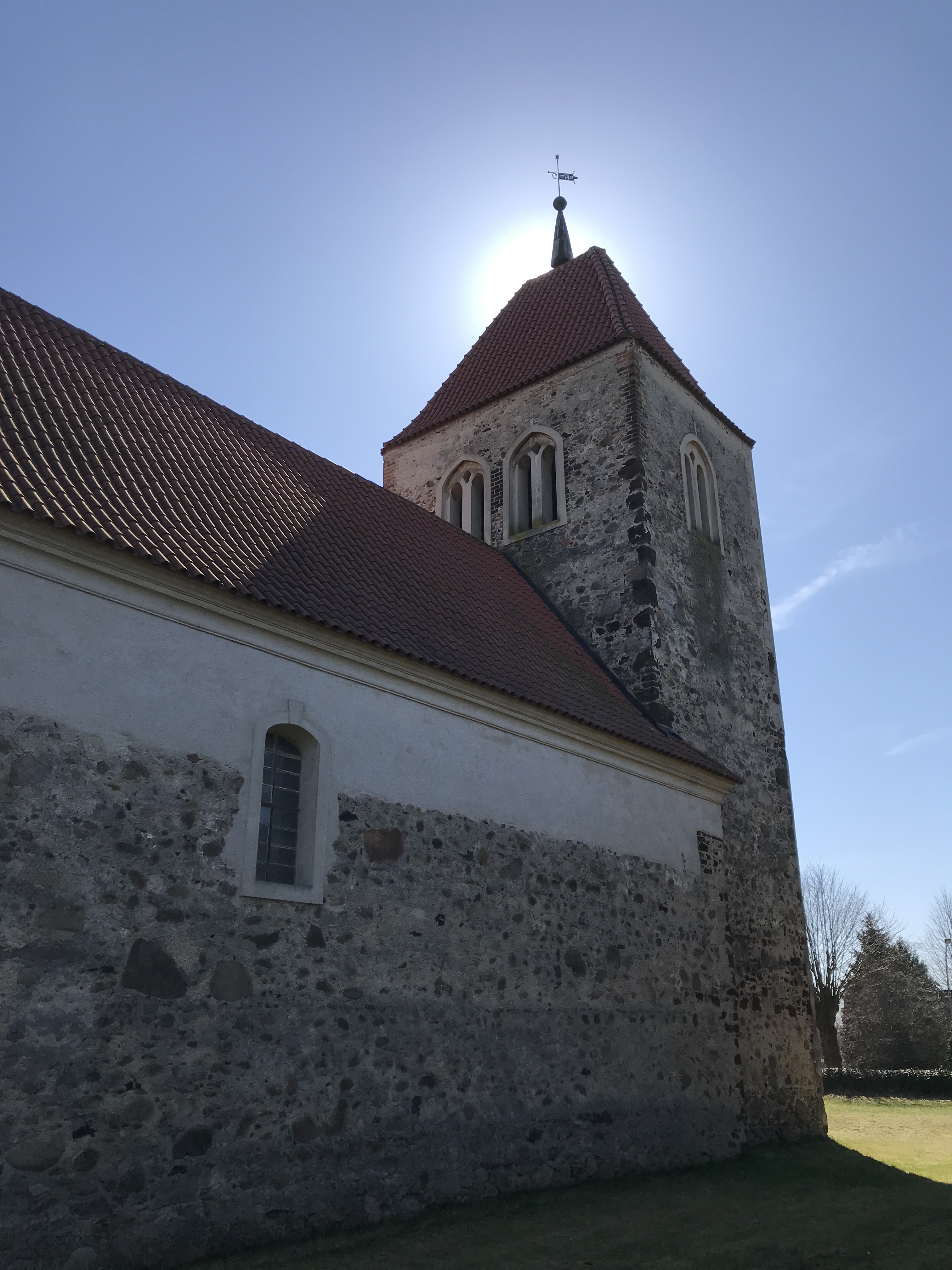 Die Dorfkirche in Beesdau, Gemeinde Heideblick im Landkreis Dahme-Spreewald entstand vermutlich im 14. Jahrhundert.